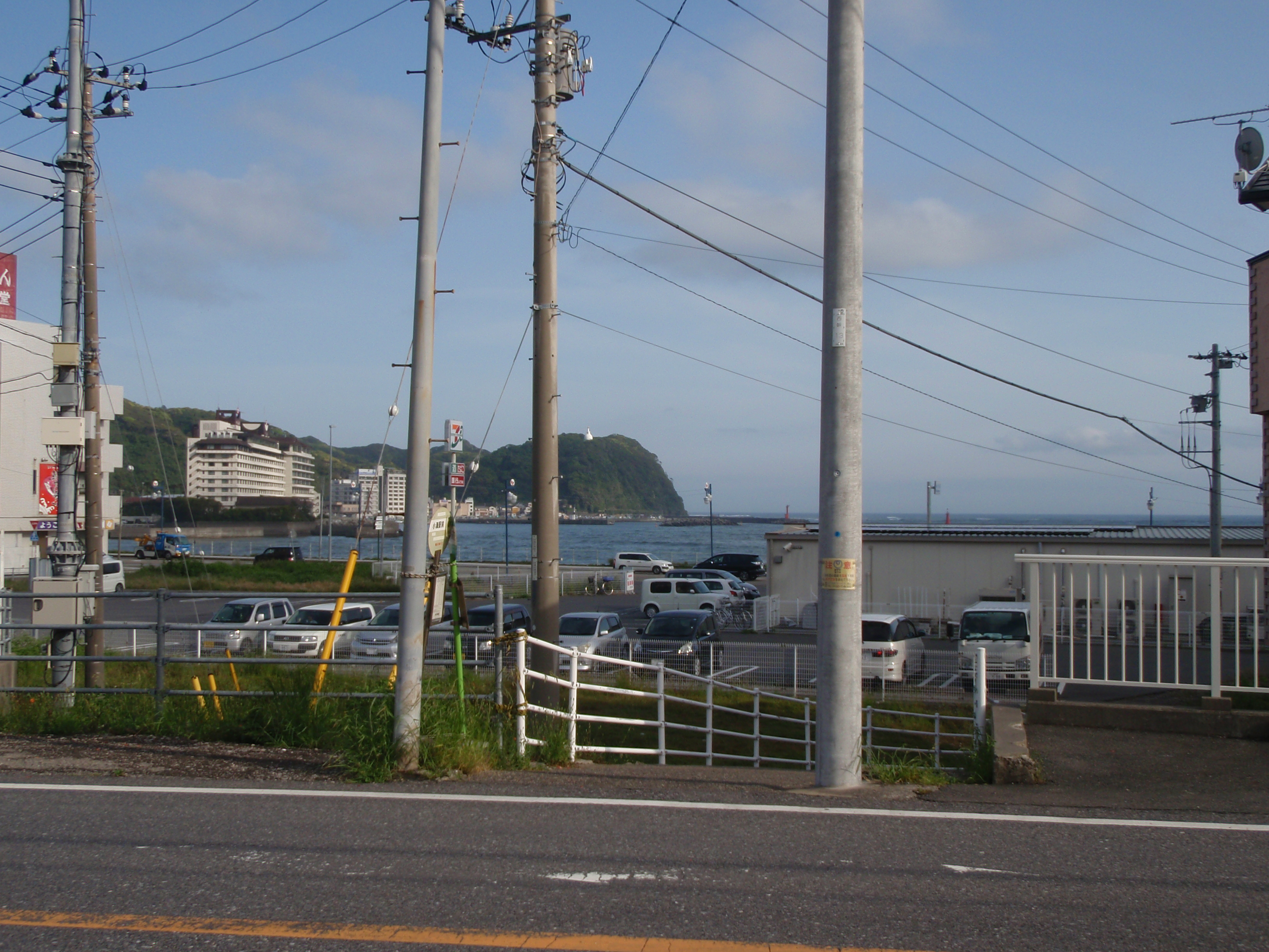 安房小湊駅前正面の風景